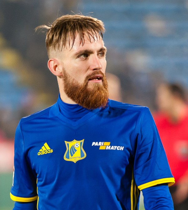 Žan Majer